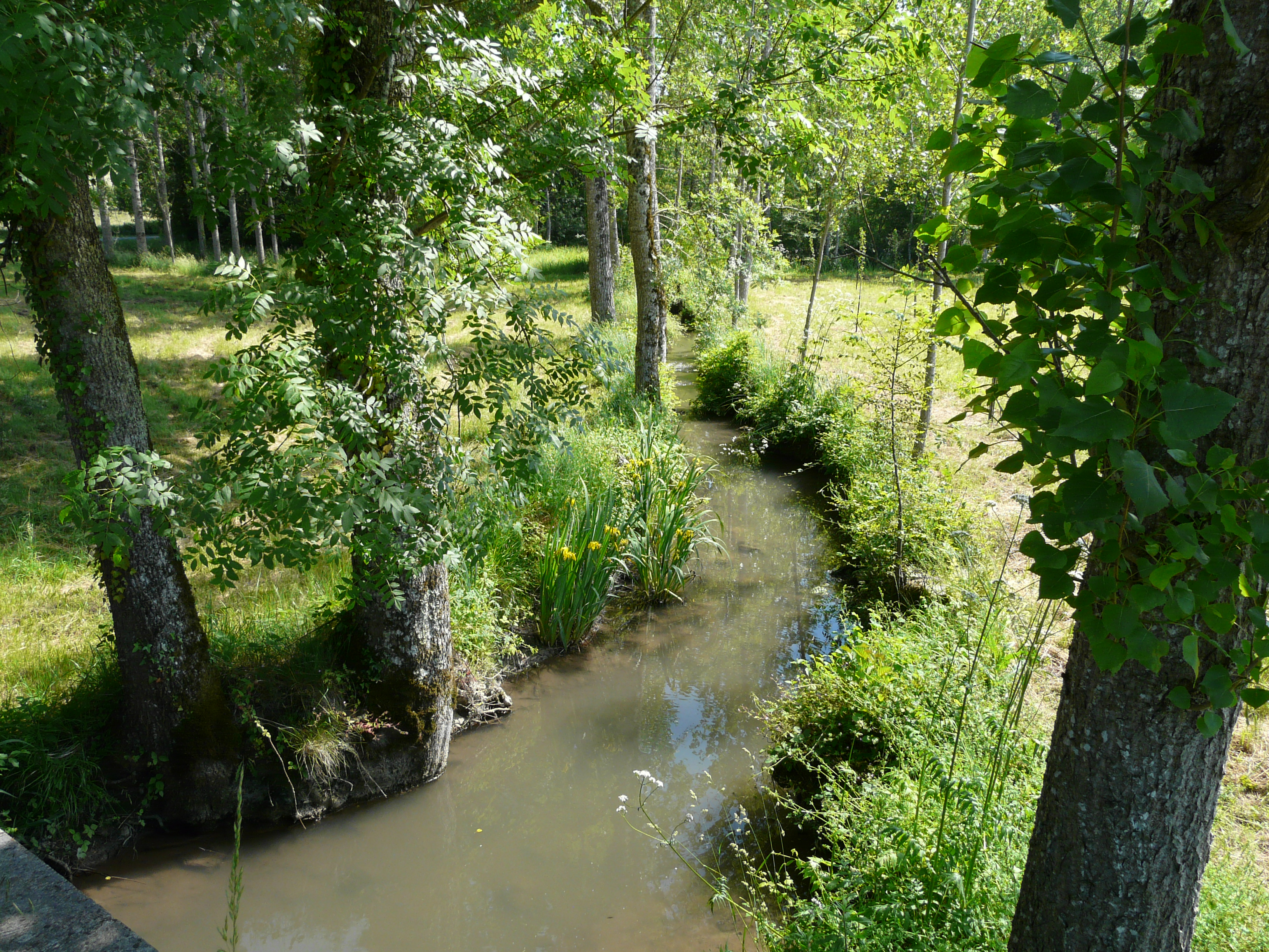 Ruisseau le Salembre à Saint-Aquilin, Dordogne, France